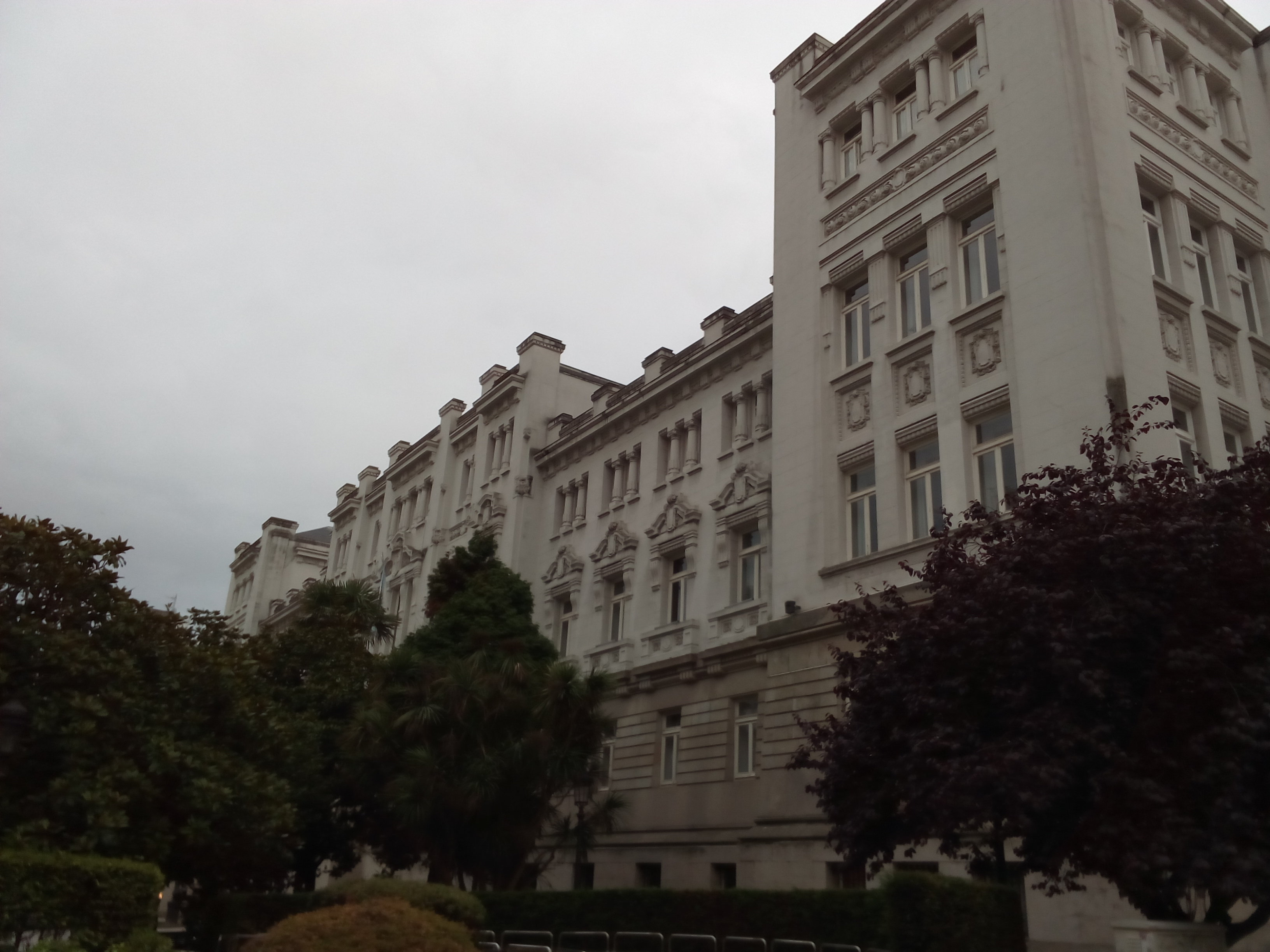 Vista xeral do Pazo de Xustiza da cidade da Coruña, sede do Tribunal Superior de Xustiza de Galicia.